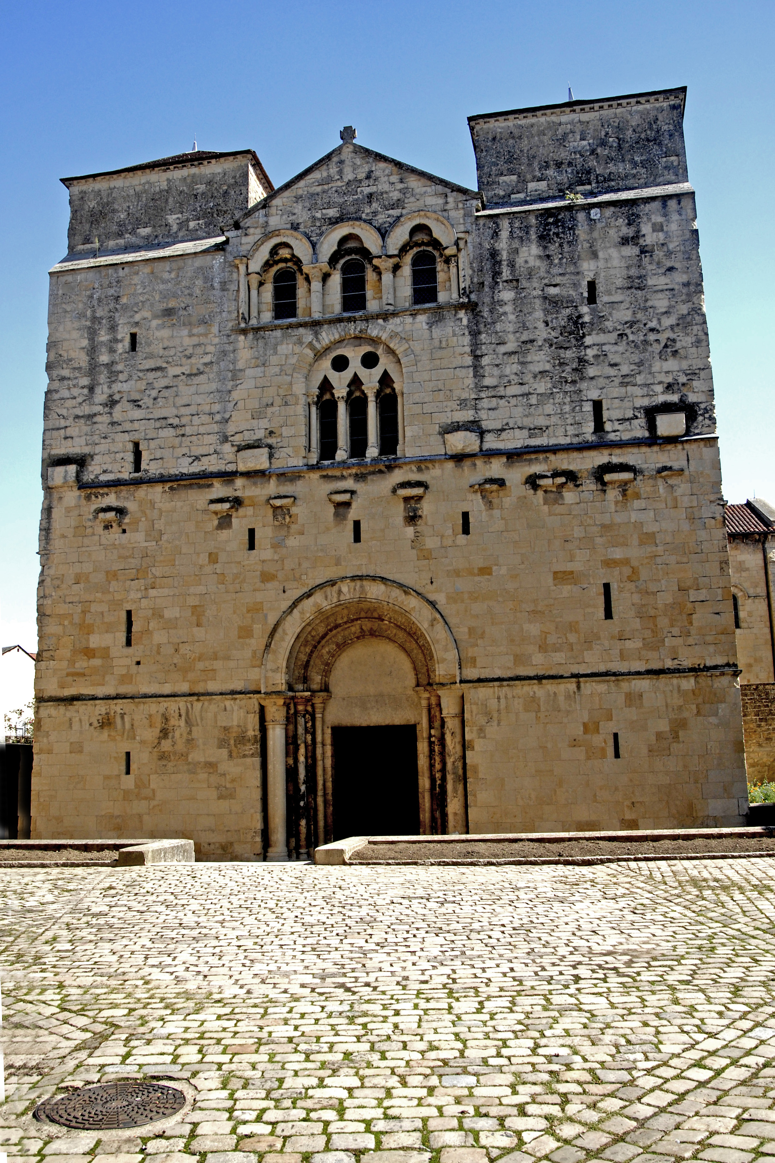 Saint-Etienne Nevers, Fassade